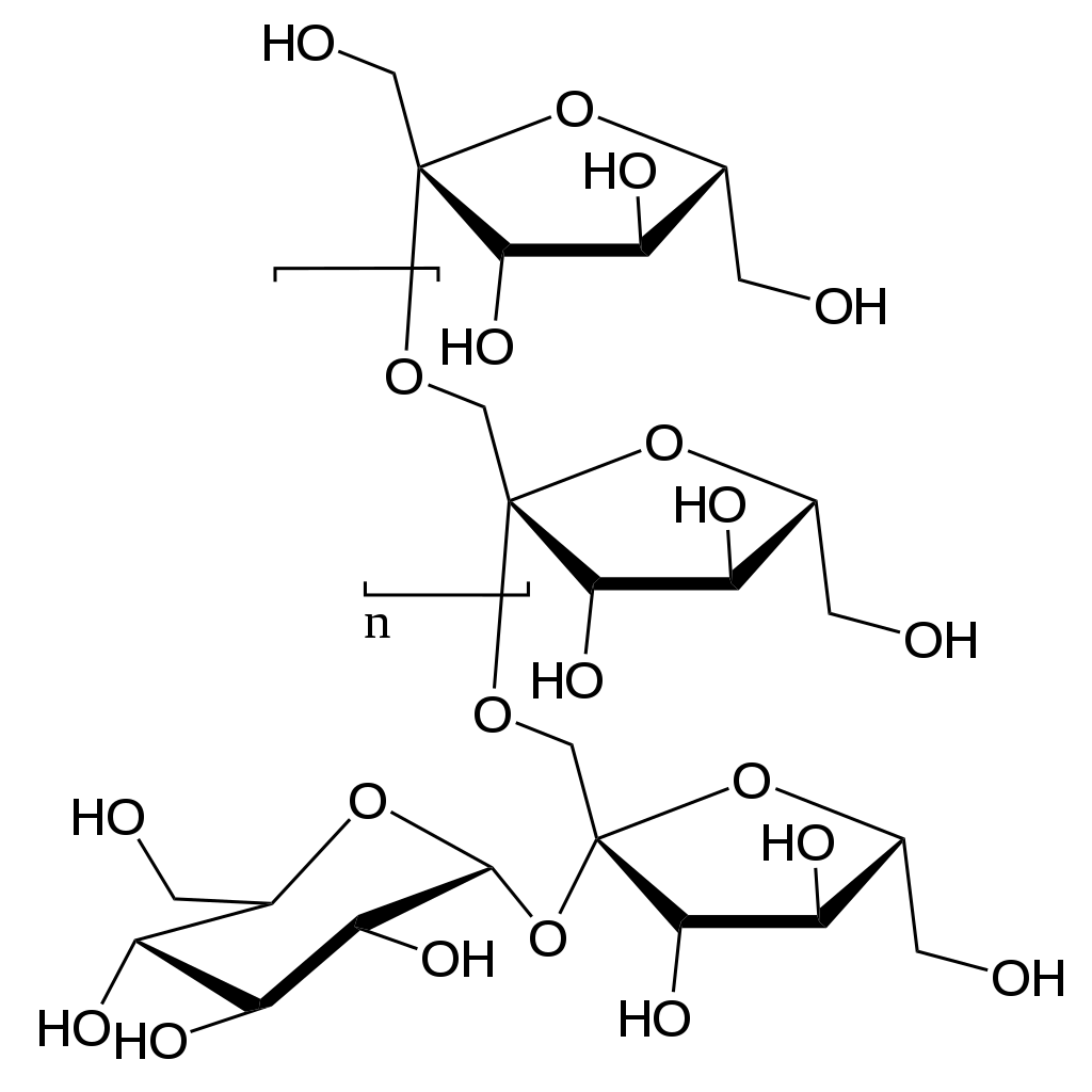 Fructooligosacàrids (FOS), estructura química d'un tipus de prebiòtic